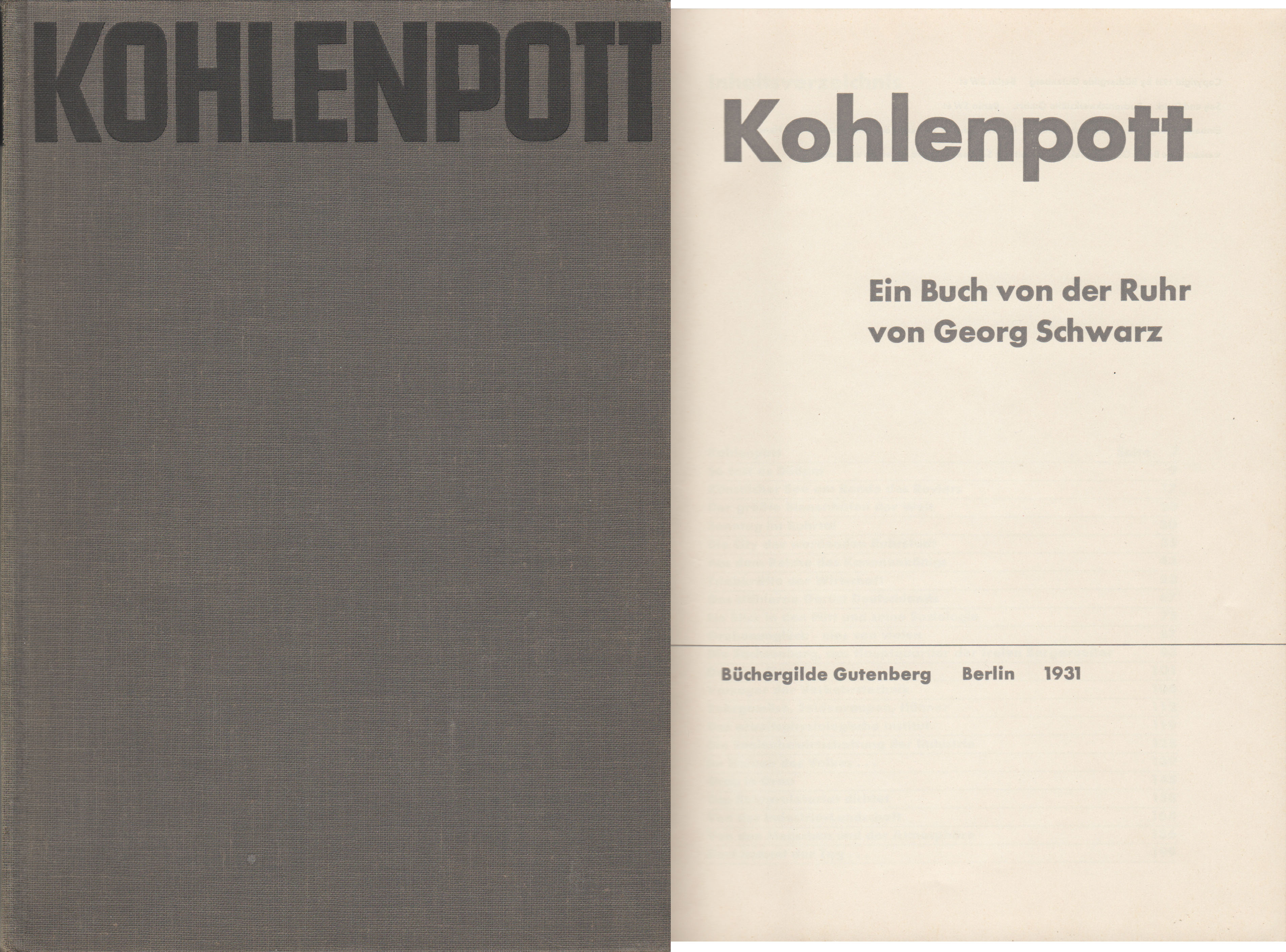 Das Buch Kohlenpott von Georg Schwarz beinhaltet die Lebens- und Arbeitsbedingungen im Ruhrgebiet. Verlegt 1931 von der Büchergilde Gutenberg Berlin. Es enthält 208 Textseiten mit zahlreichen Fotos aus verschiedenen Quellen.